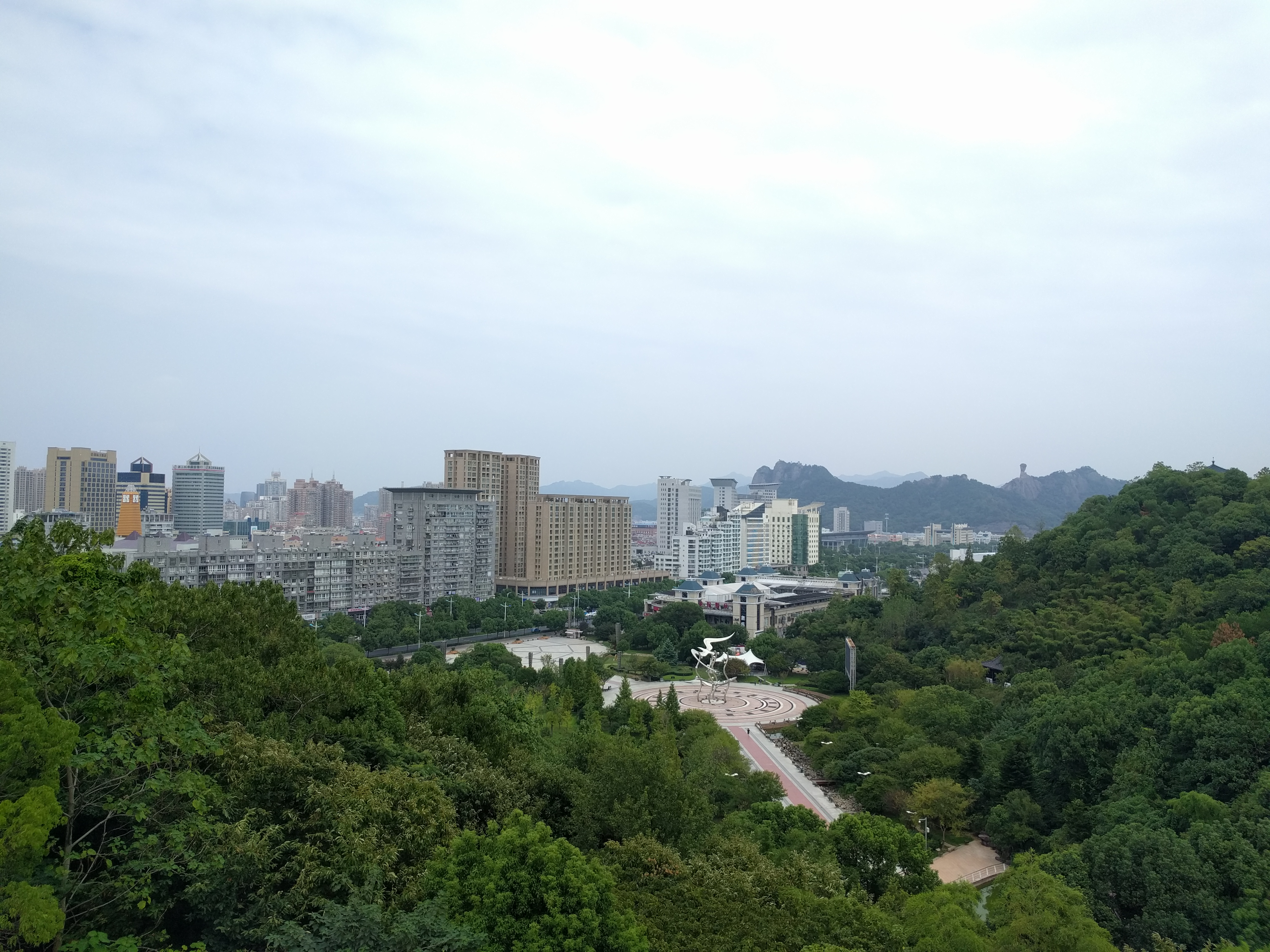 中文（中国大陆）: 温岭城市一景（摄于东辉阁）